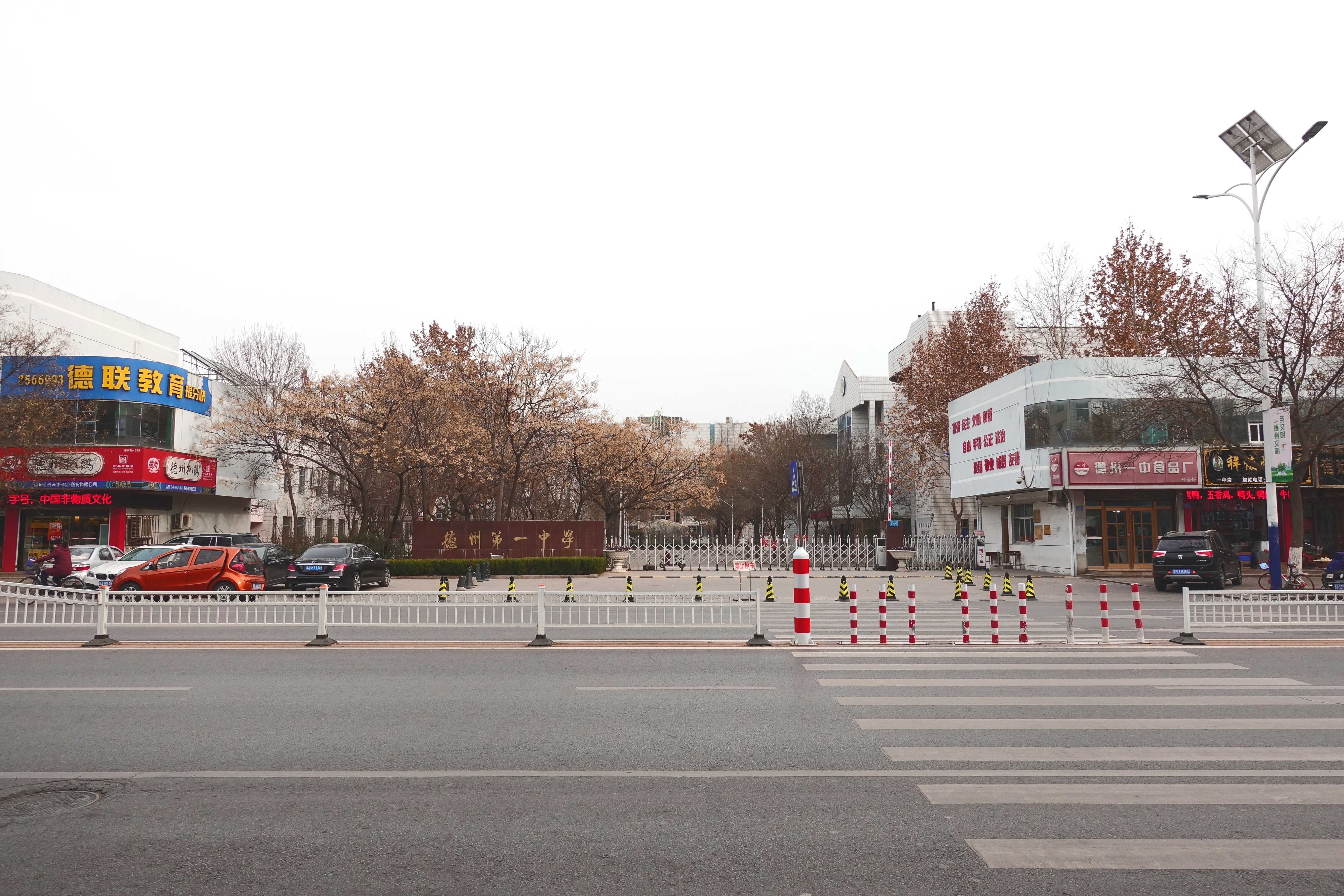 德州一中老校区西门，山东省德州市